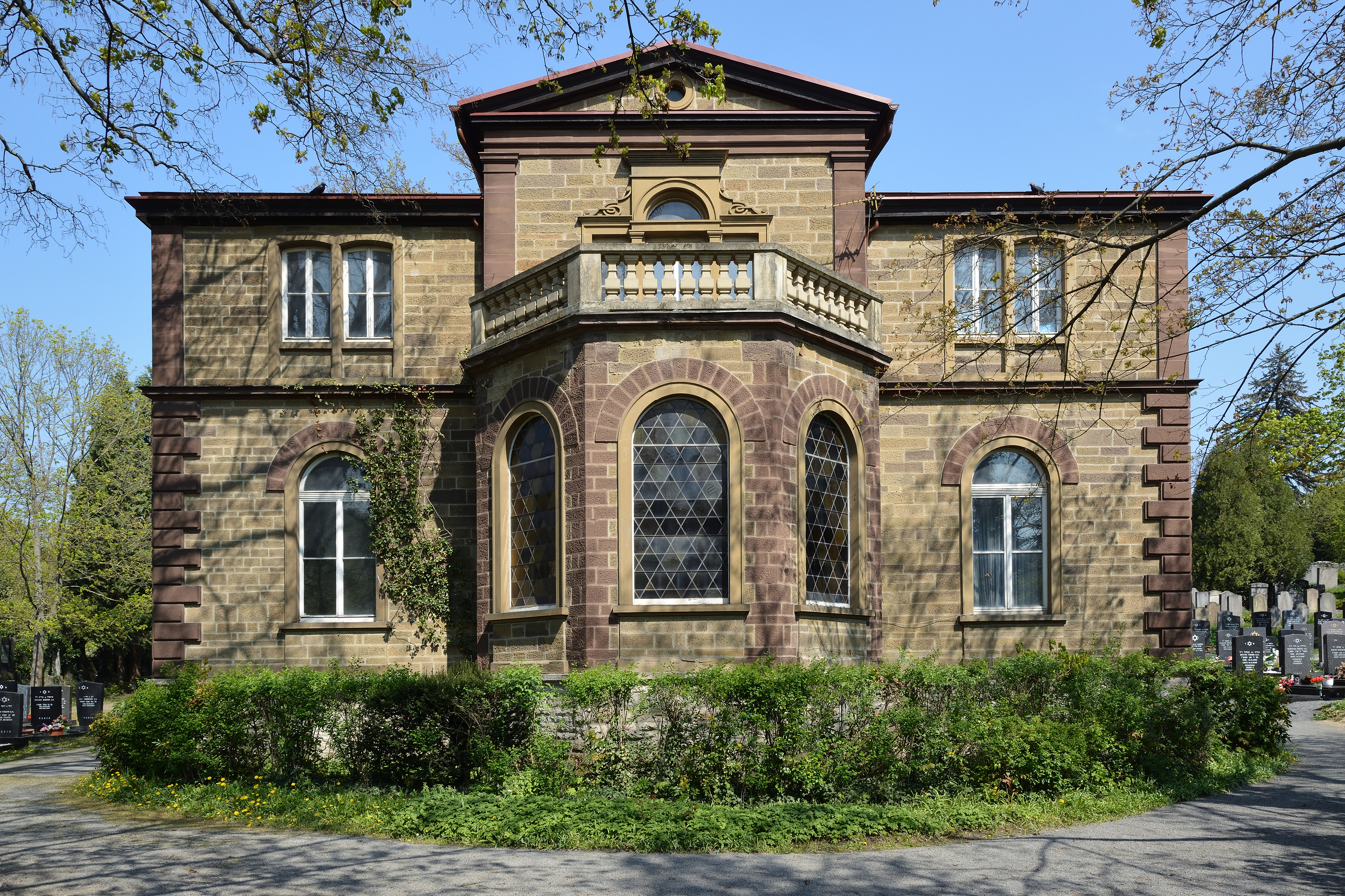 Impressionen vom jüdischen Friedhof in Würzburg.